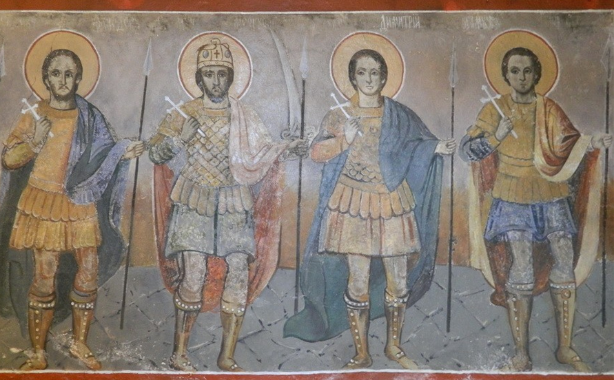 Фреска од црквата „Св. Никола“ во прилепско Обршани